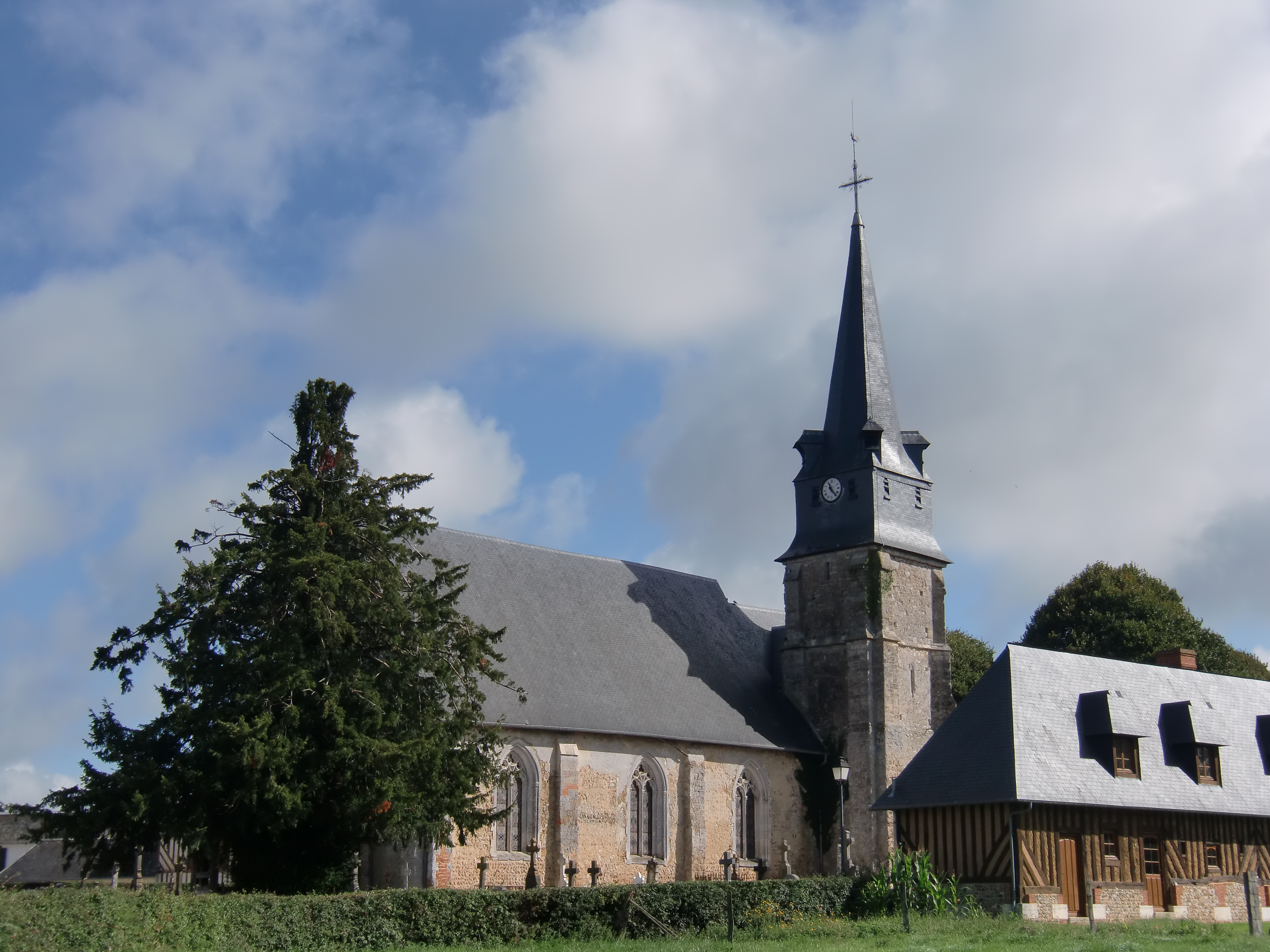 église de Morainville à Morainville-Jouveaux (Eure, Normandie, France)